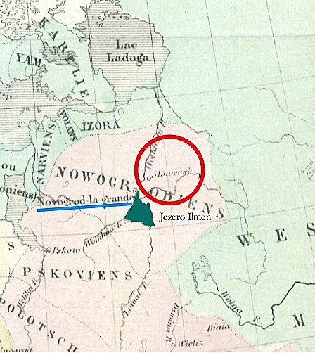 Slowensk in poznejši Veliki Novogrod z jezerom Ilmen (izrez iz Carte des Pays SLAVO-POLONAIS) 2 Poudarki z rdečo, temno zeleno in modro barvo ter napis Jezero so dodani naknadno za boljšo razločitev.